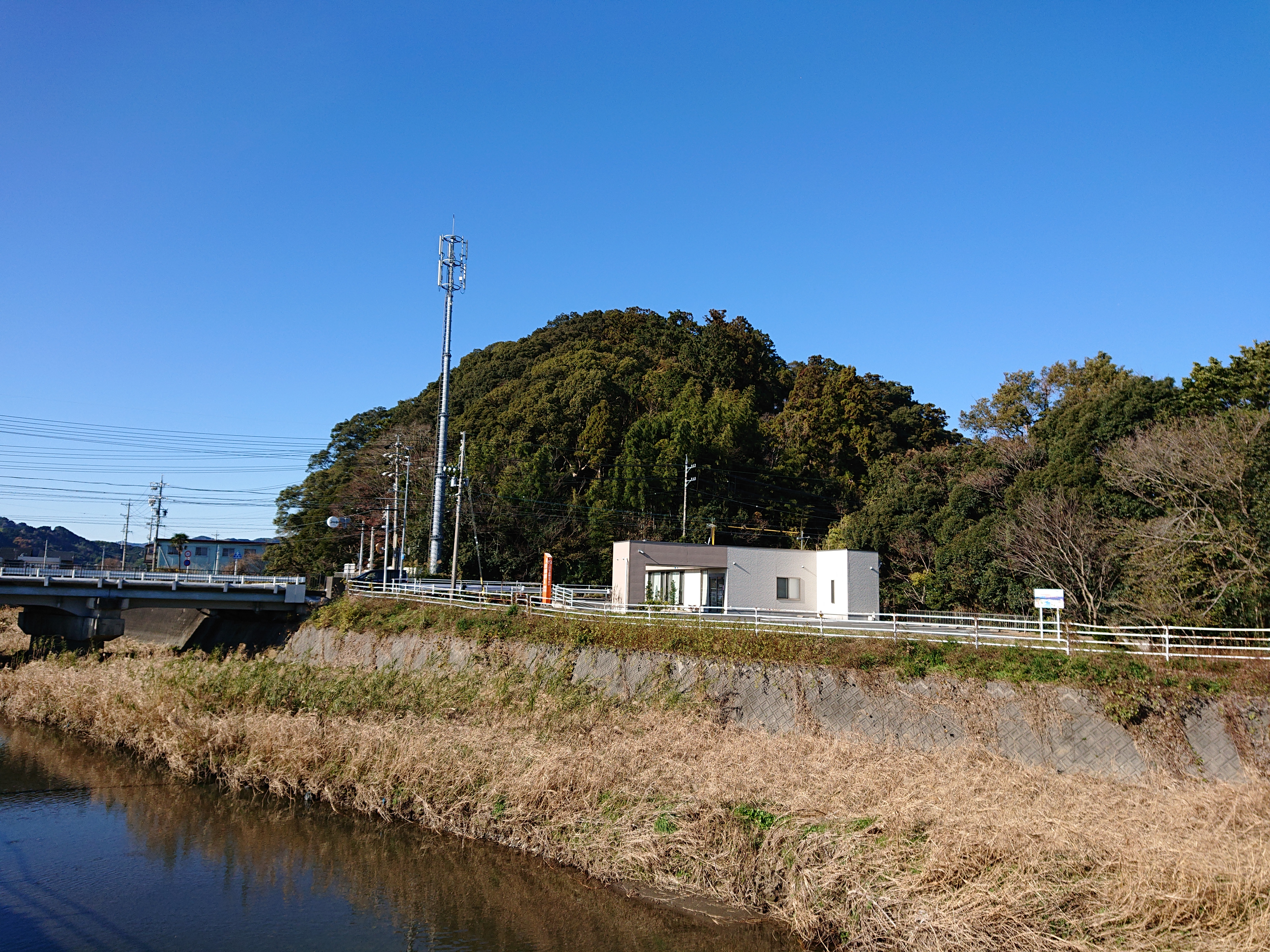 八幡山砦跡。現在の静岡県藤枝市八幡の青山八幡宮。